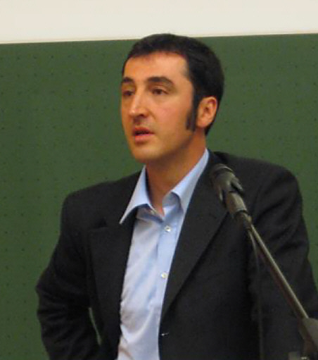 Cem Özdemir bei einem Gastvortrag an einem akademischen Abend an der Berufsakademie Villingen Schwenningen am 26.04.2007 zur Themenreihe "Migration und Integrationspolitik".